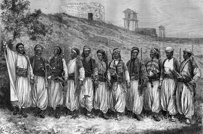 Alawites dancing dabke.